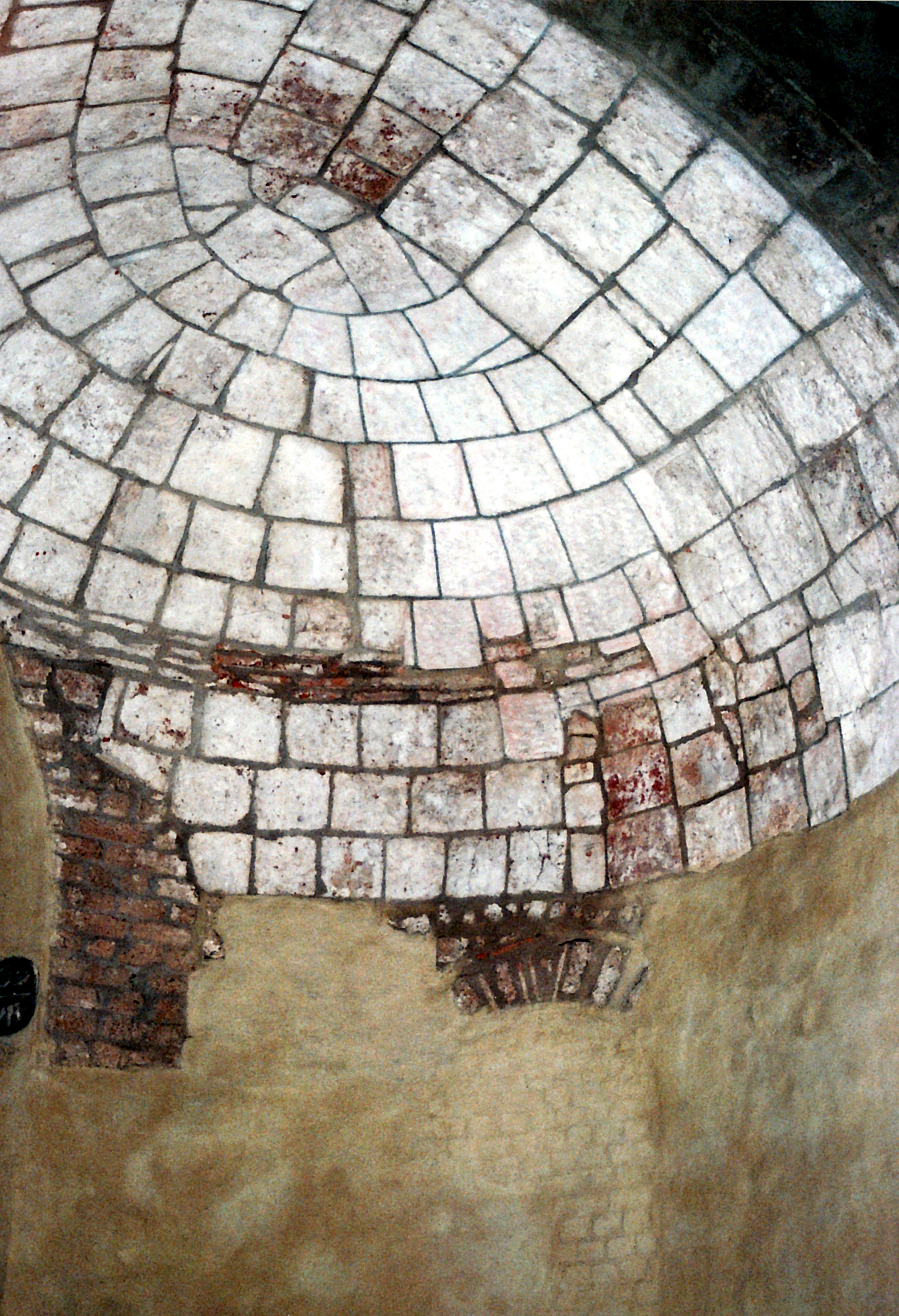 Köln, St. Gereon: Südliche Apsis des spätantiken Zentralbaus.